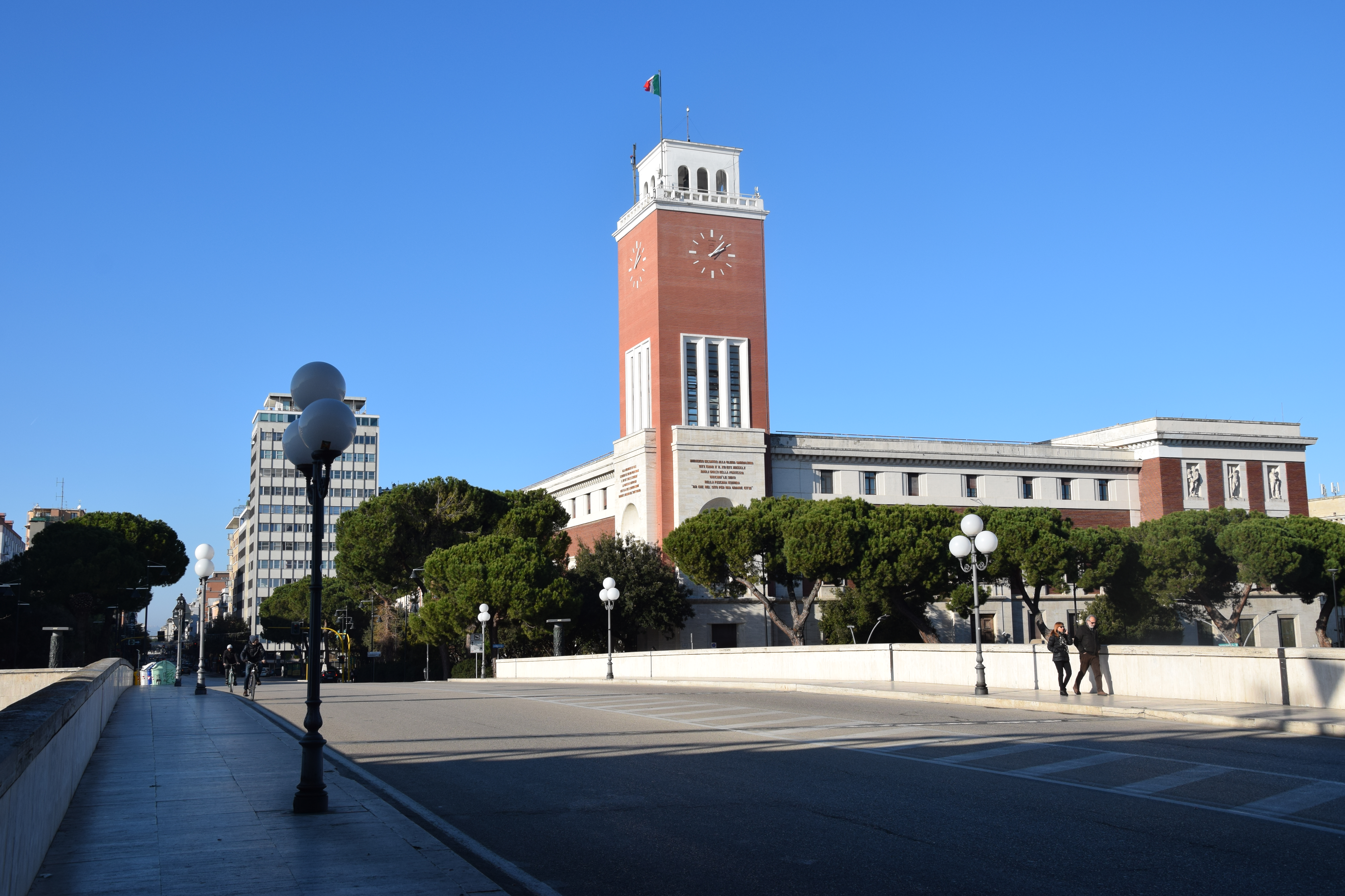 Comune di pescara